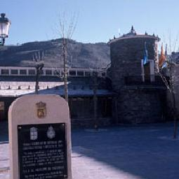 Ayuntamiento de Ibias, Asturias.